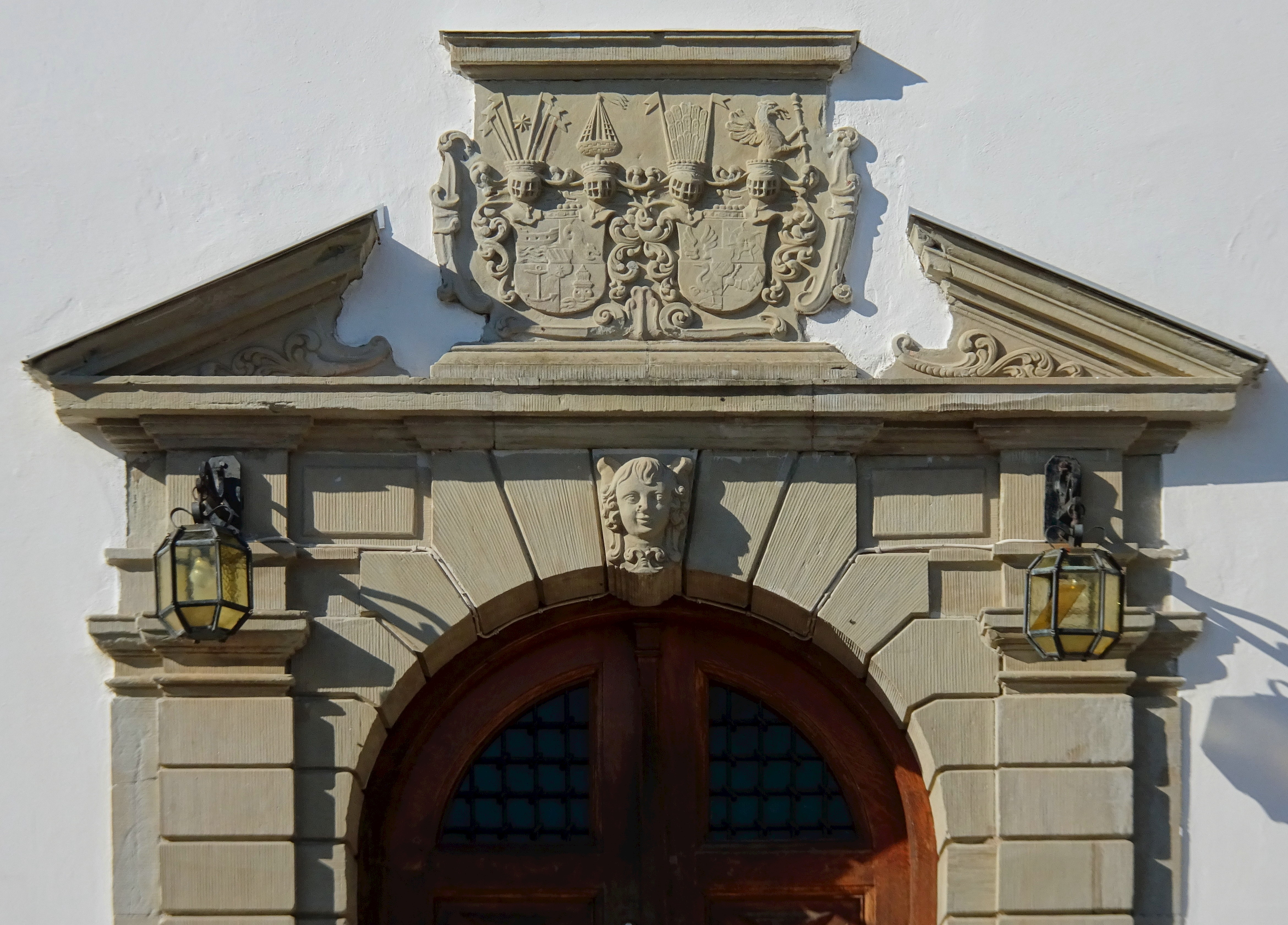 Årsta slott portal